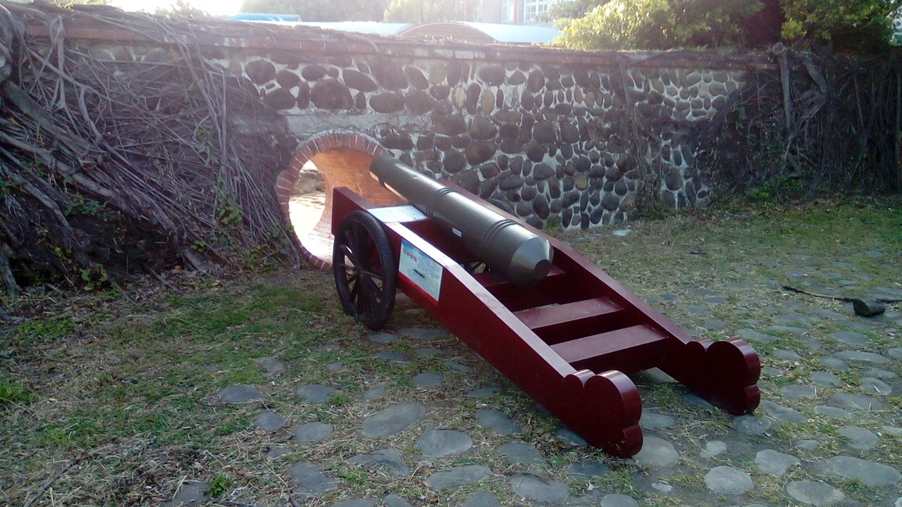 位於四草大眾廟對面 少見的魚雷管式砲台 目前僅存一座